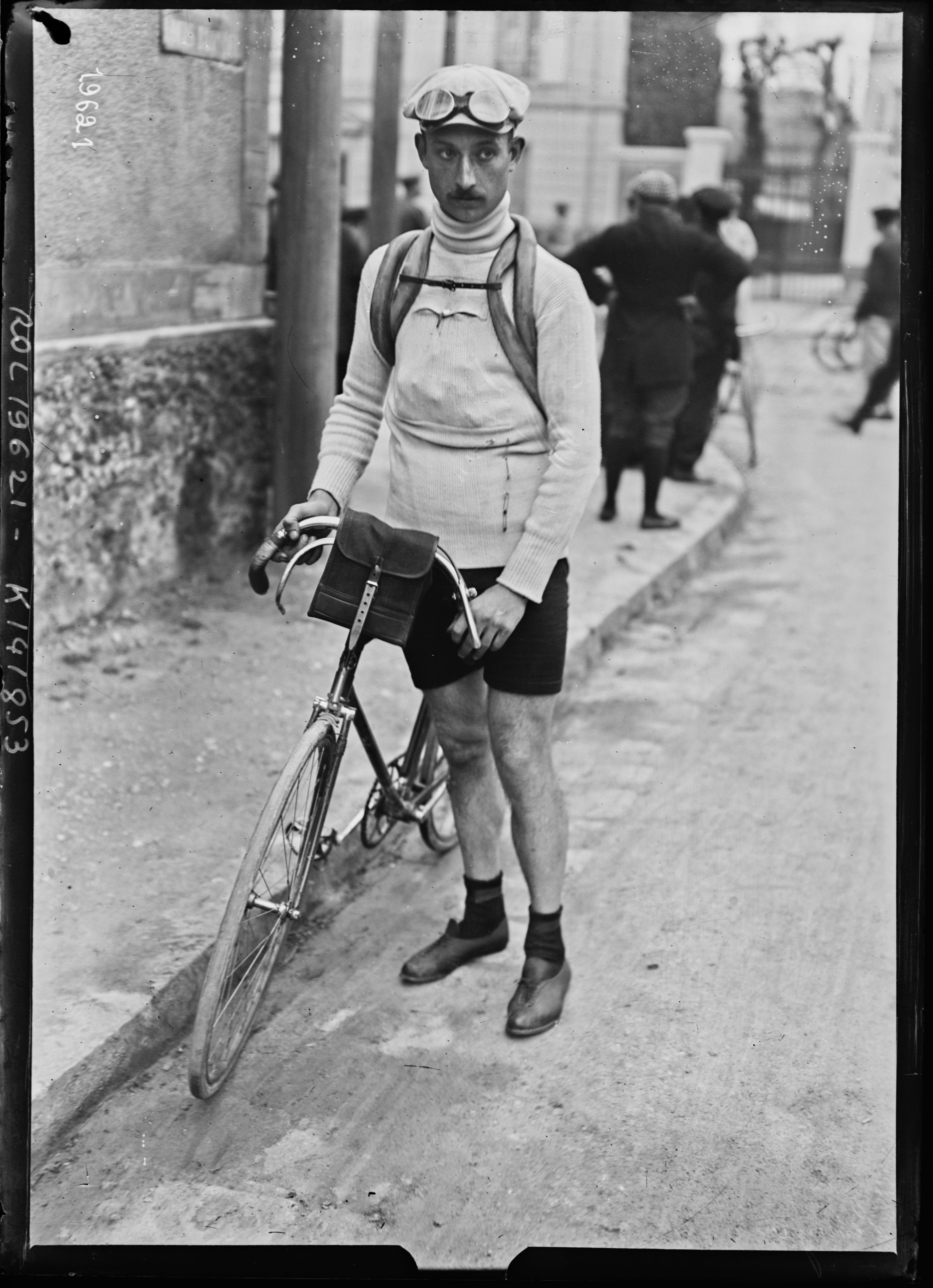 Maurice Léturgie au départ de Paris-Roubaix 1912